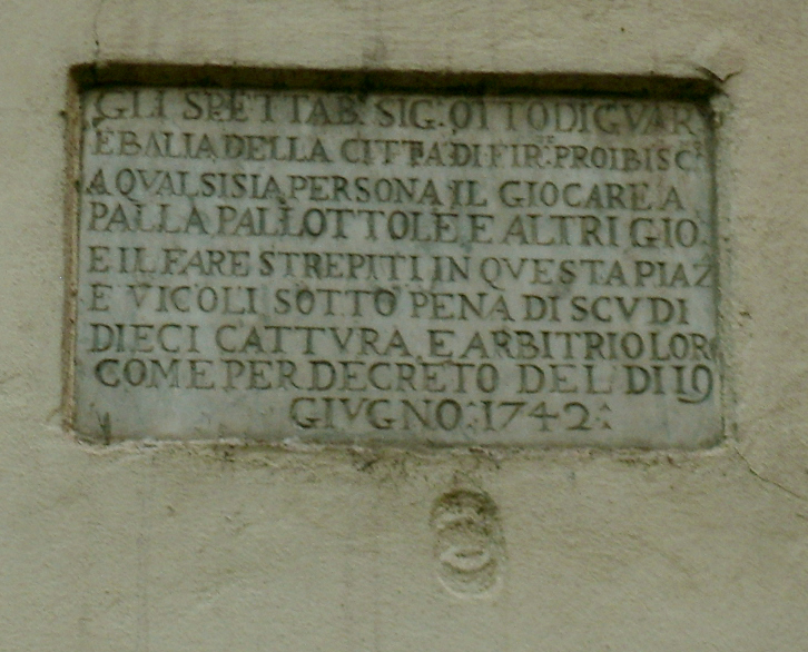 Piazza del giglio, targa signori otto